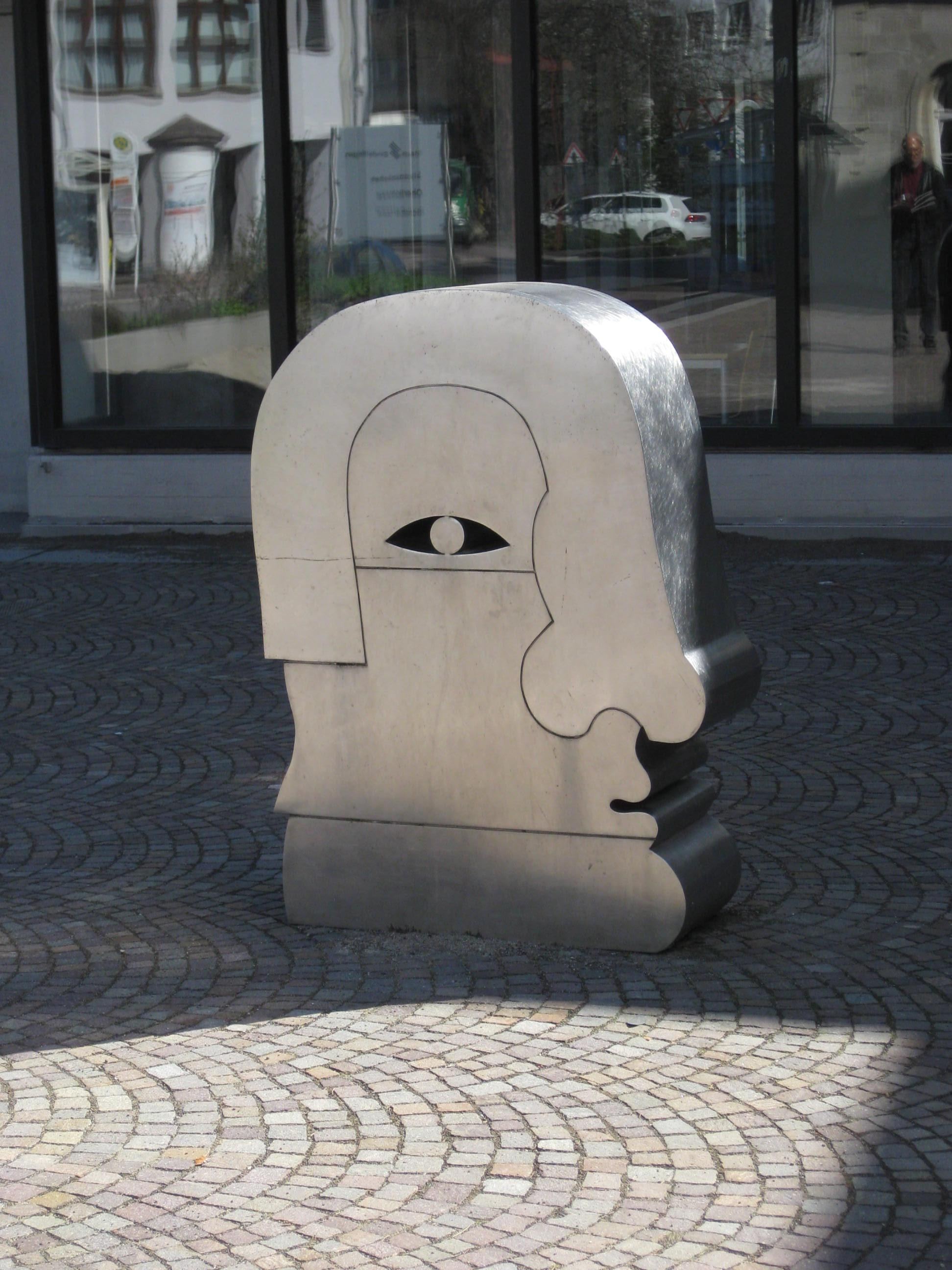 Horst Antes, Kopf, 1968, Städtische Galerie, Sindelfingen, Deutschland